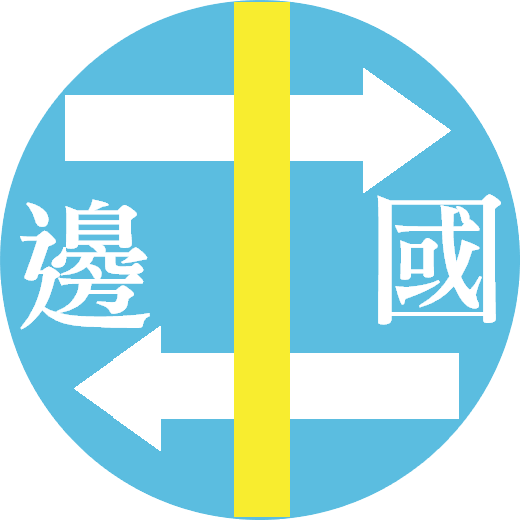 簡化一邊一國行動黨黨徽部分元素，作為一邊一國行動黨實際黨徽的替代。預計用於台灣政黨模板。